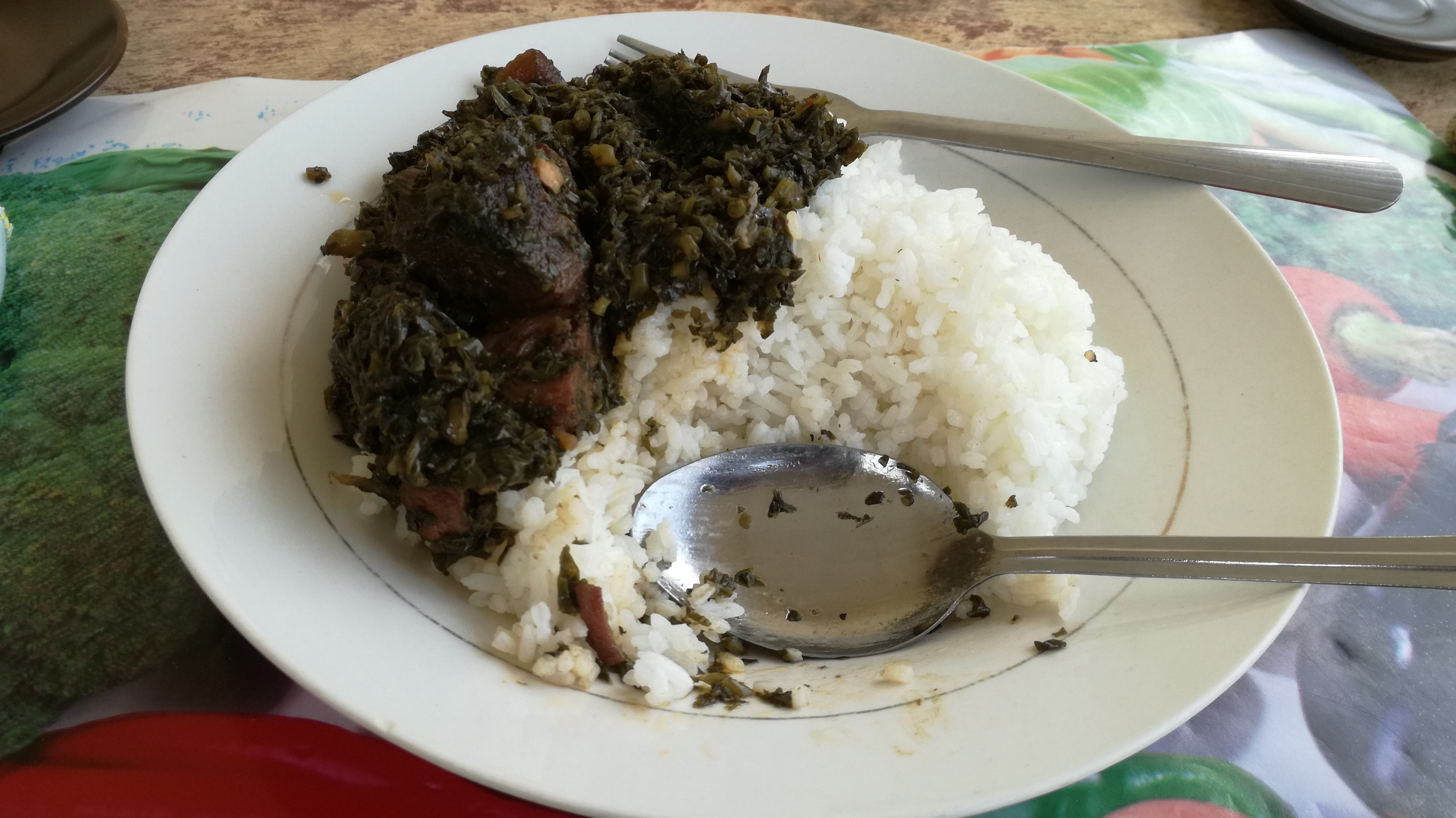 Plat de riz local ivoirien accompagné de sauce faite à base de feuilles de patate